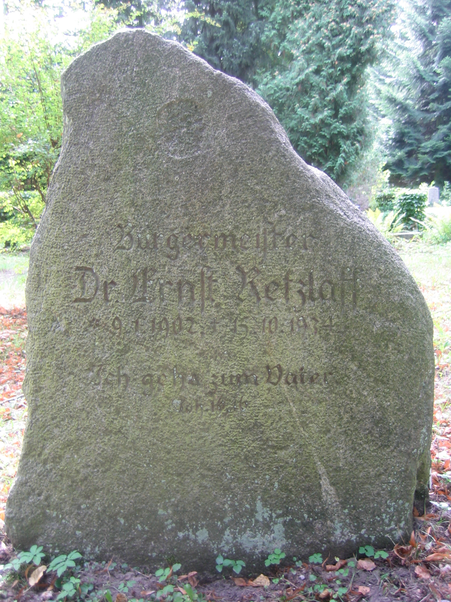 Grabstein des Neubrandenburger Bürgermeisters Ernst Retzlaff auf dem Neuen Friedhof (Neubrandenburg)